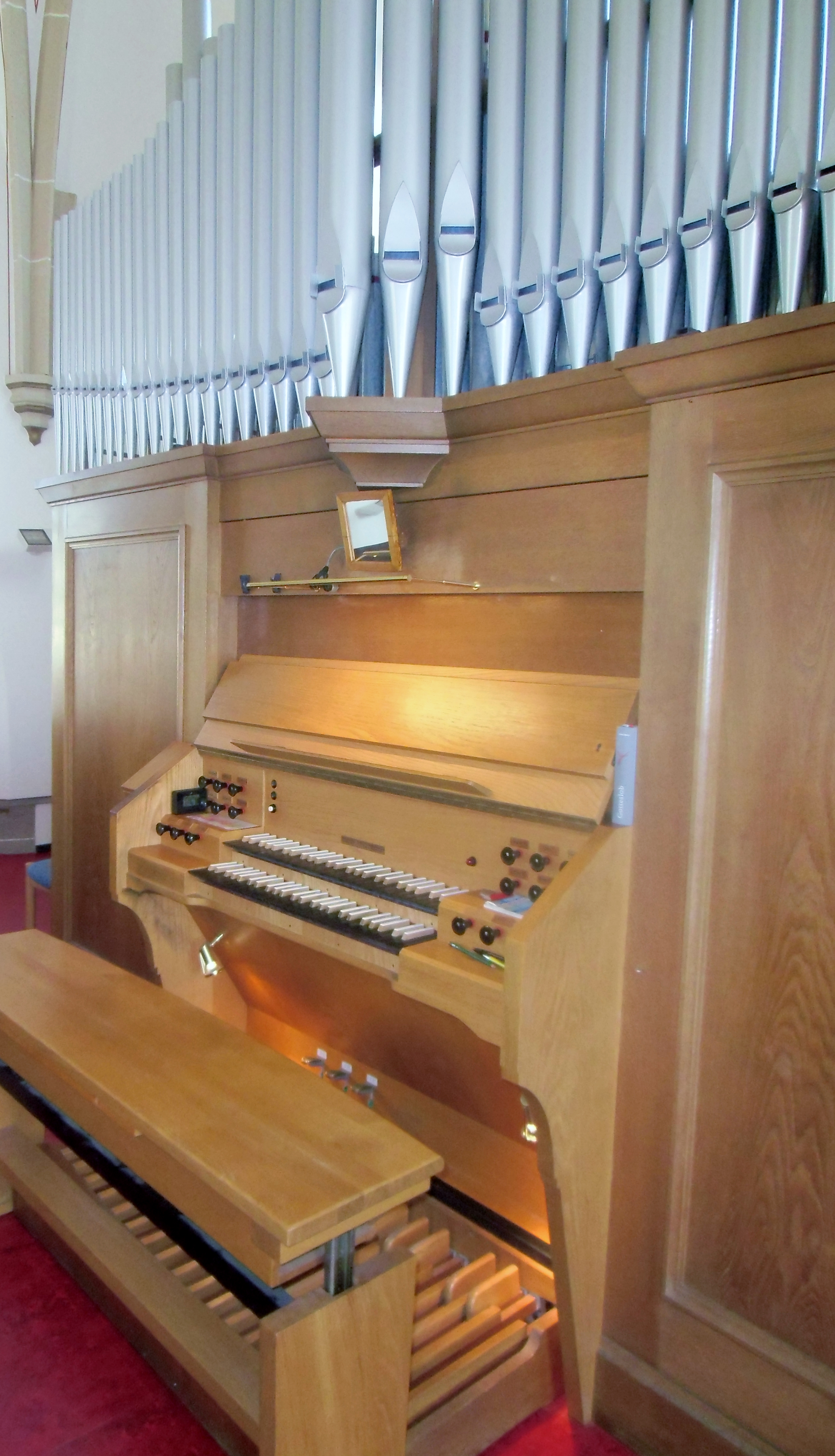 Spieltisch St. Josef, Darmstadt-Eberstadt